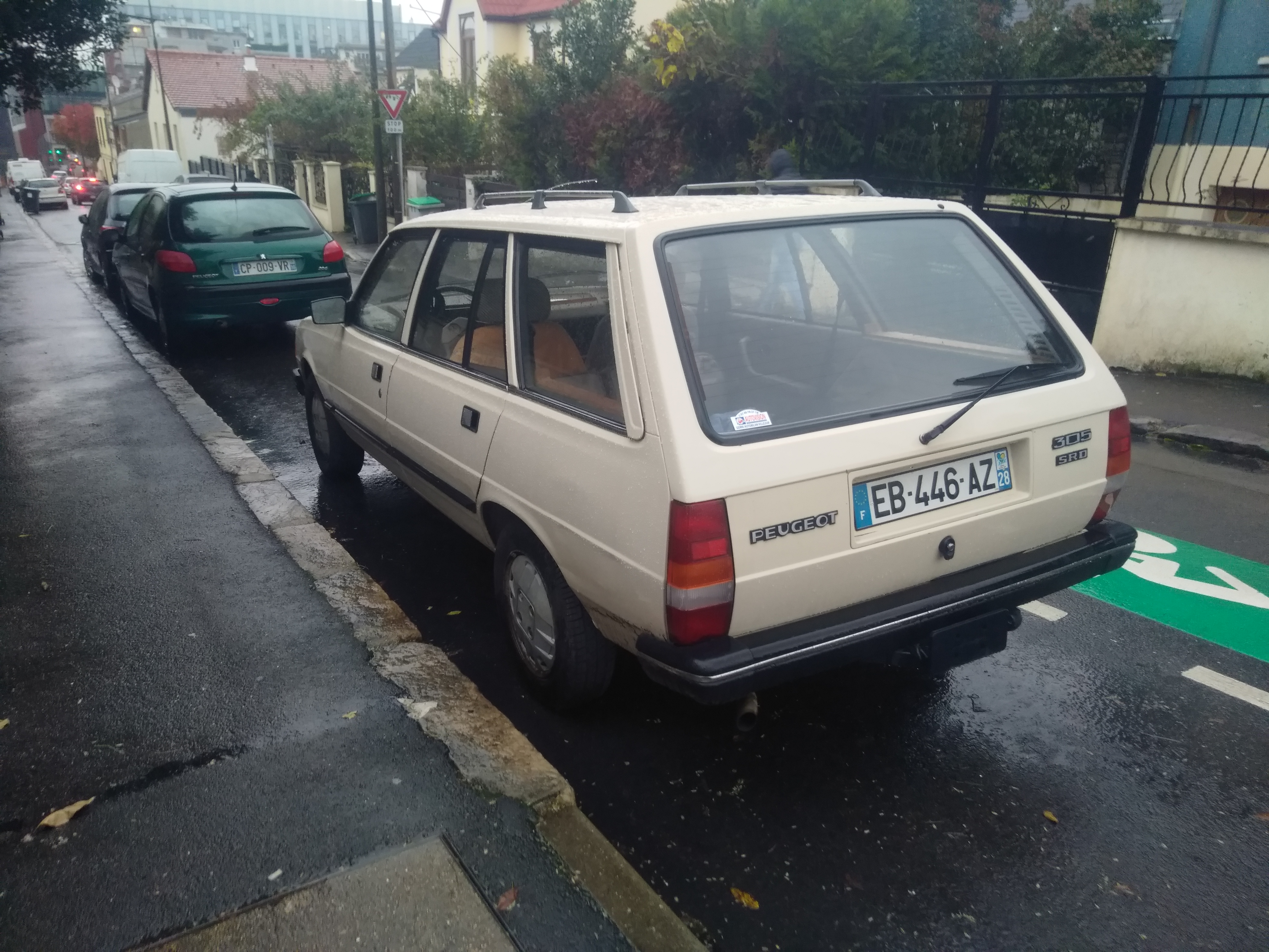 Villejuif - Peugeot 305 break